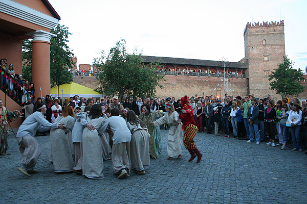 Театральне дійство на "Ночі в Замку"